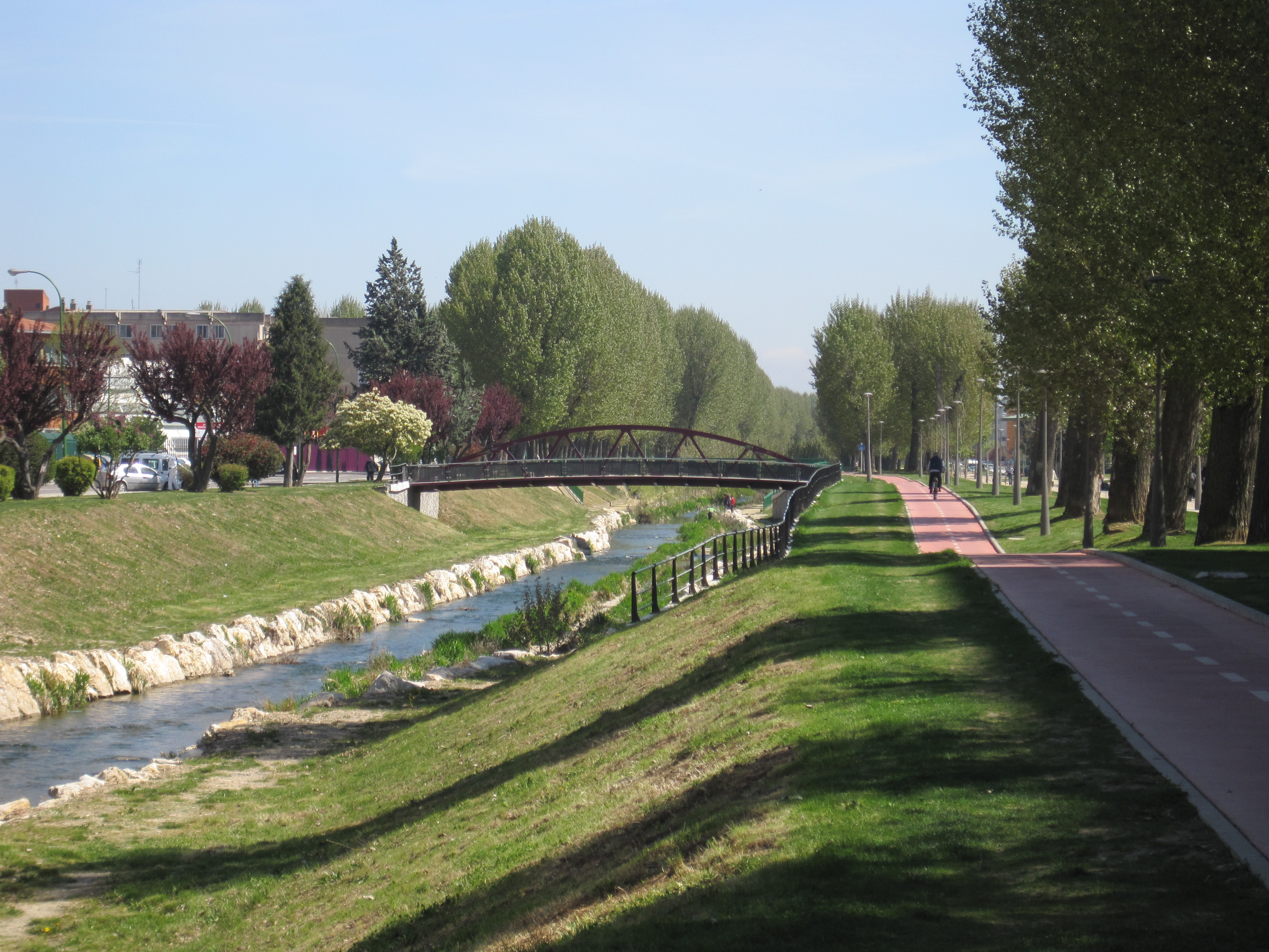 Vista del parque lineal a orillas del río Vena, en Burgos. Mirando hacia el este.